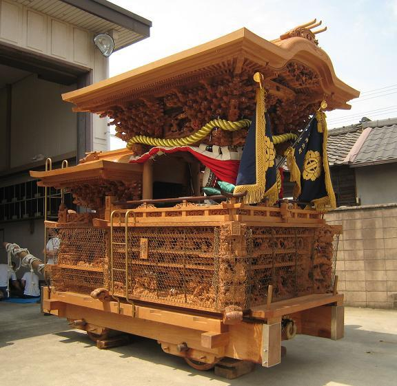 深井 だんじり